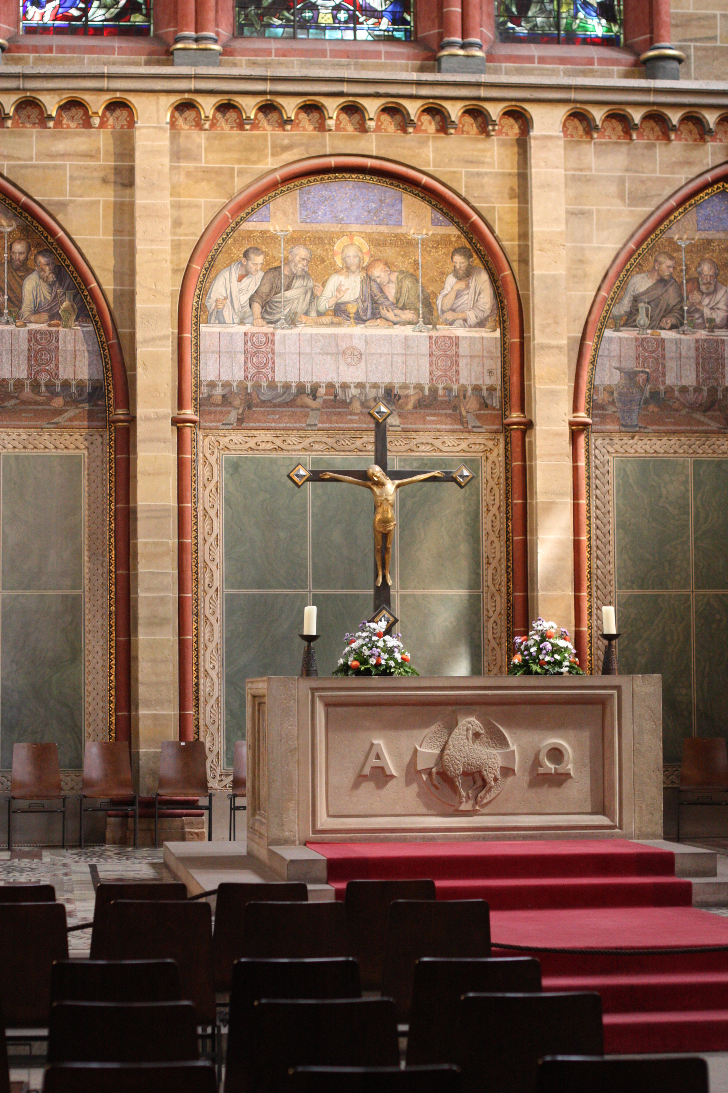 Bremer Dom